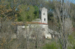 tour de pechon st antoine